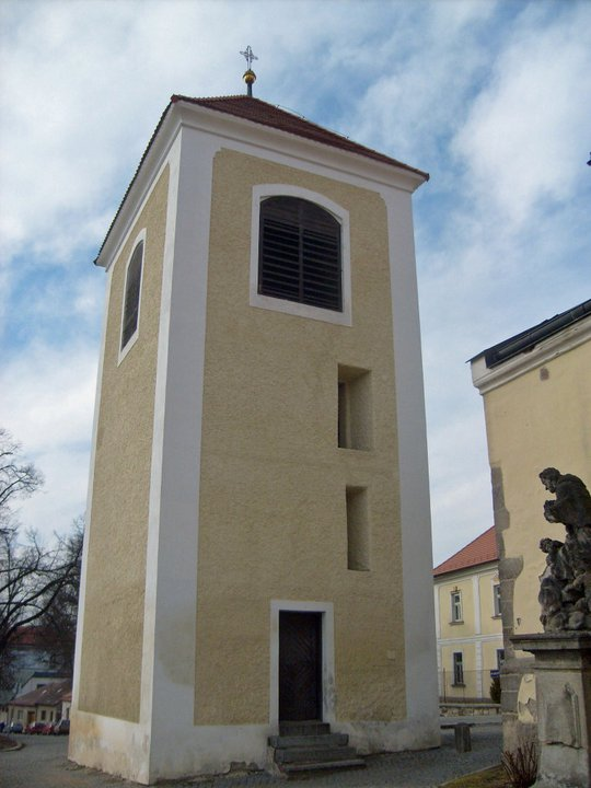 BenešovHorniZvonice1